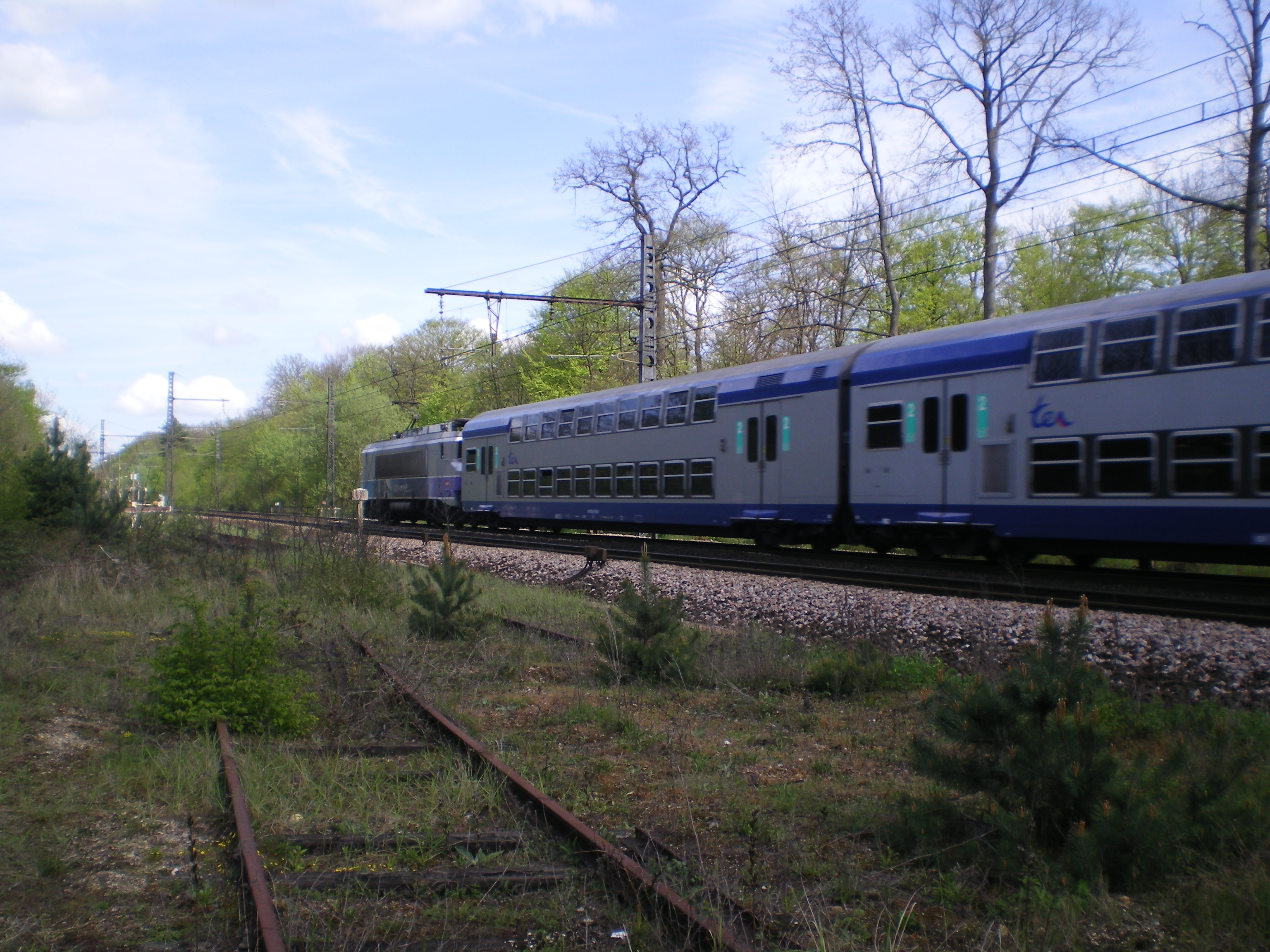 Rame V2N poussée par une BB7200 "En voyage"